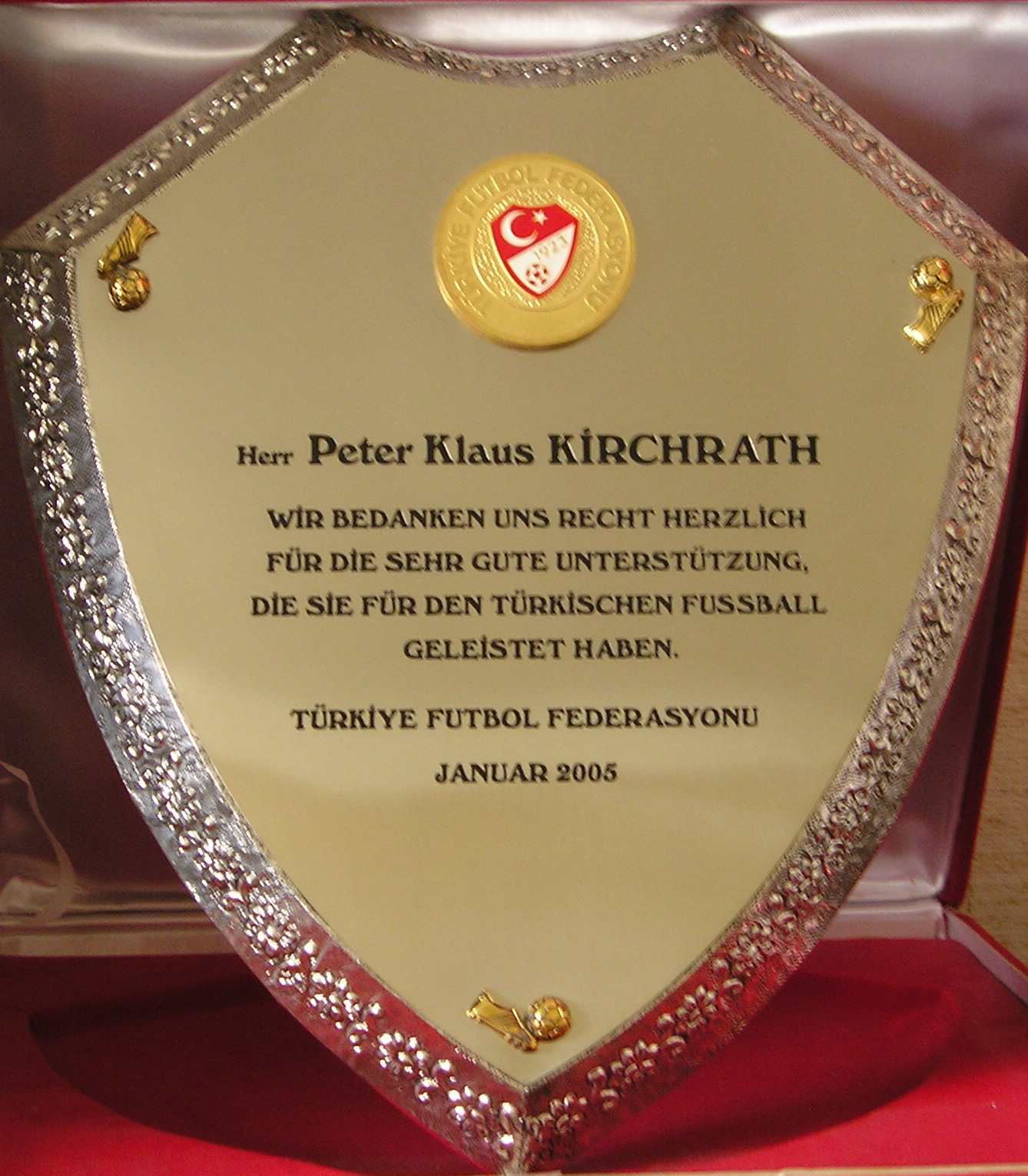 Ehrenschild des Türk. Fußiverbands